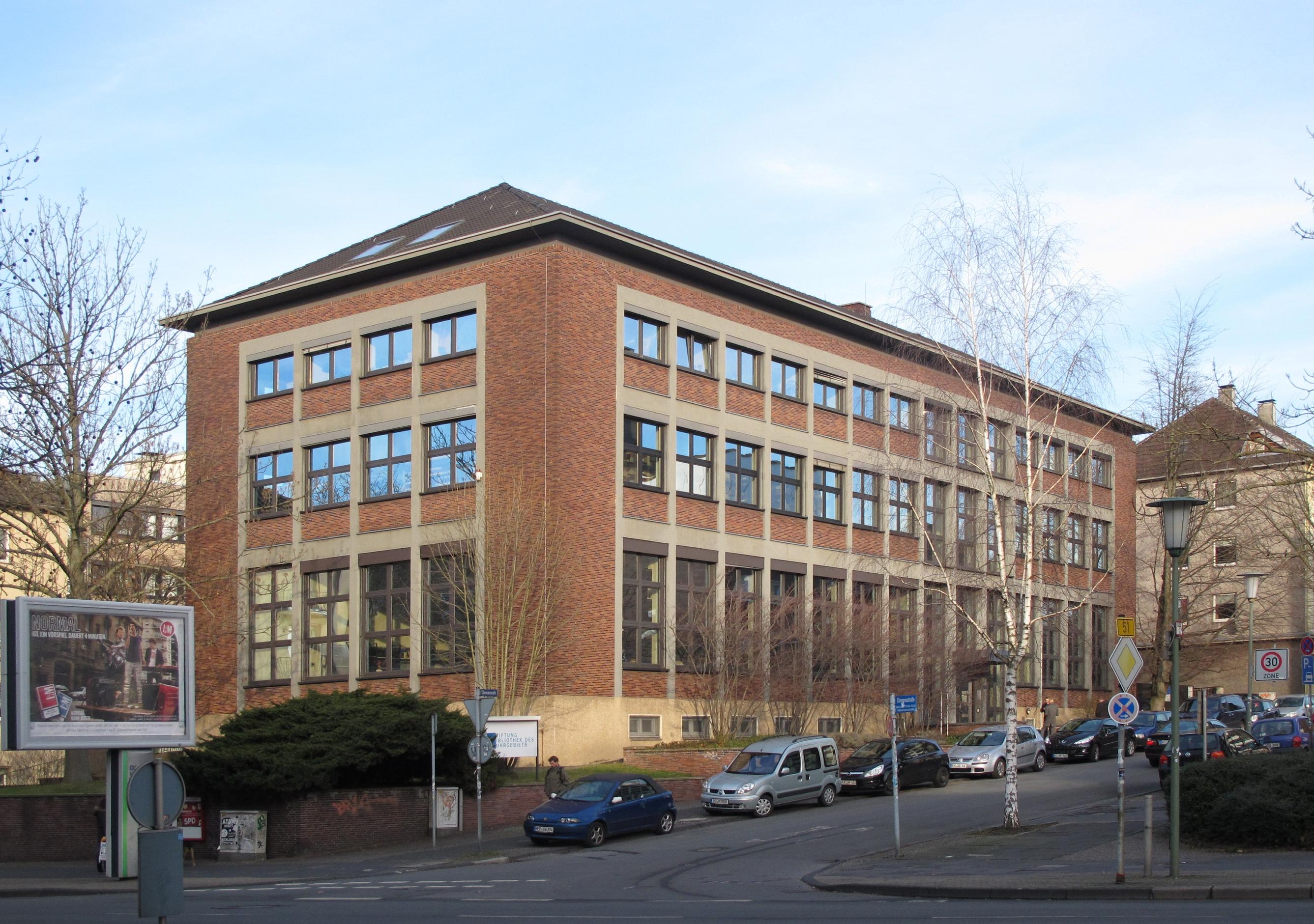 In der ehemaligen Druckerei (Berg-Verlag) der IG Bergbau und Energie beherbergt heute die Stiftung Bibliothek des Ruhrgebiets, das Archiv für soziale Bewegungen und das Institut für soziale Bewegungen.